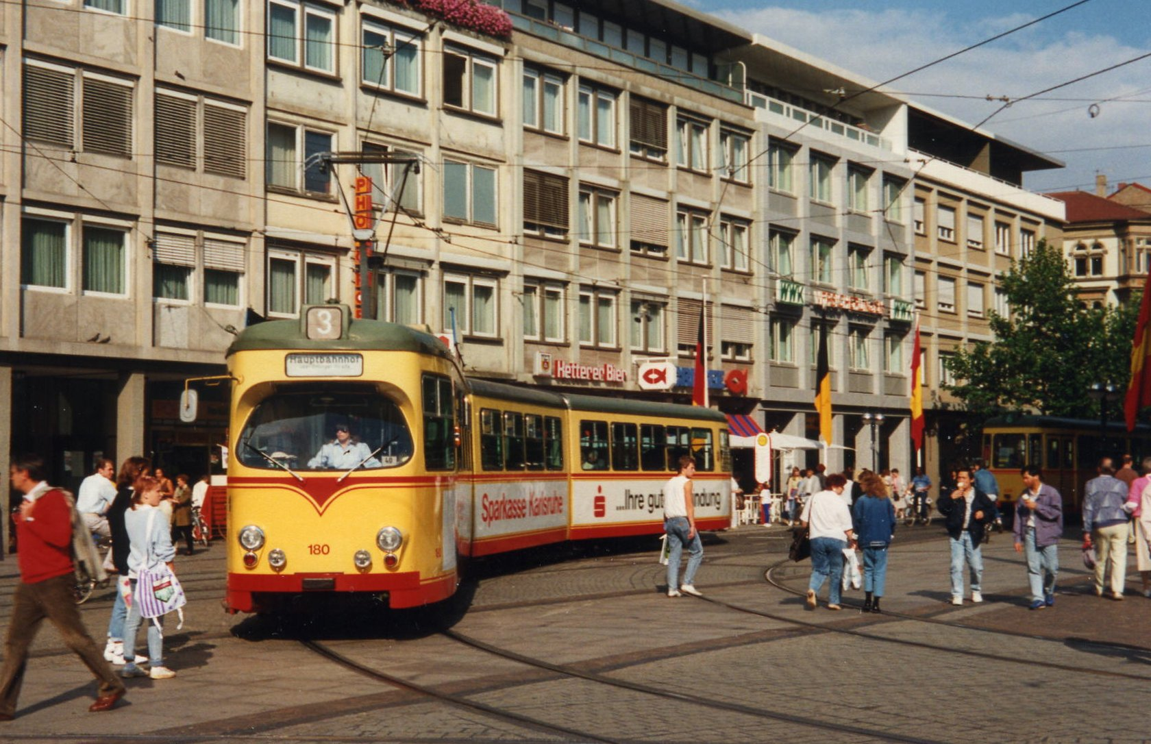 Straßenbahn-Gelenktriebwagen Nr. 180 der Karlsruher Straßenbahn bei der Einfahrt aus der Kaiserstraße auf den Marktplatz in Karlsruhe